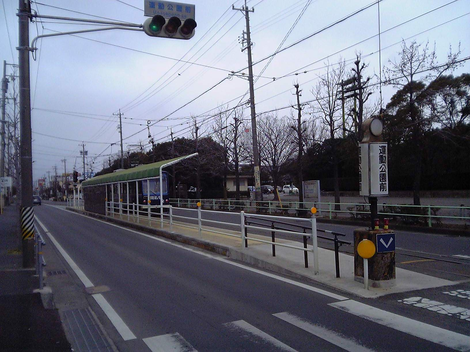 豊橋鉄道運動公園前駅